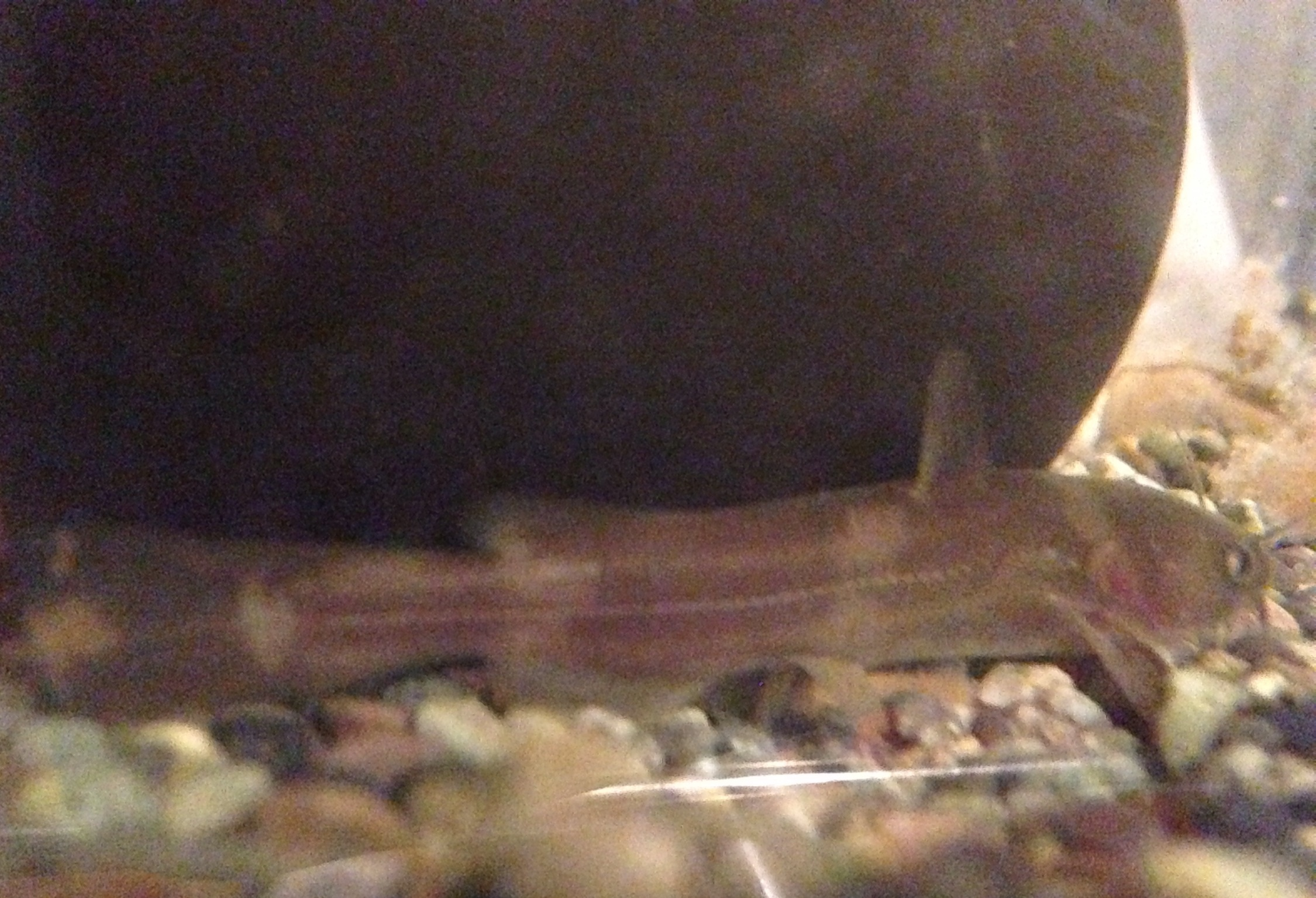 帷子川産ギバチ